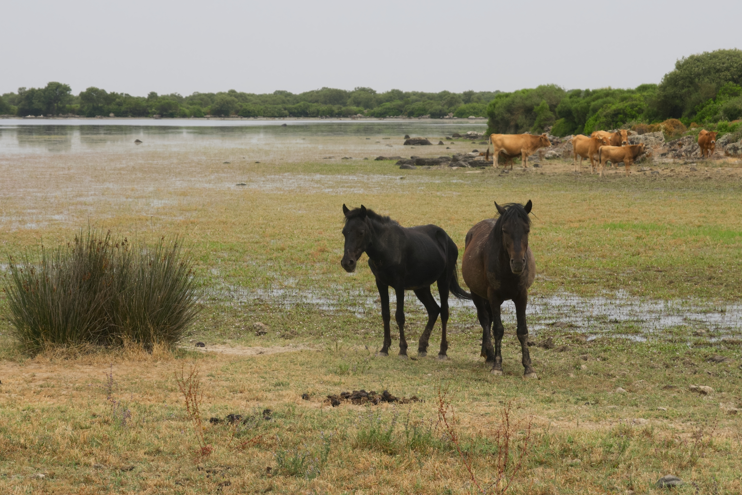 Caballo semisalvaje característico de Cerdeña.